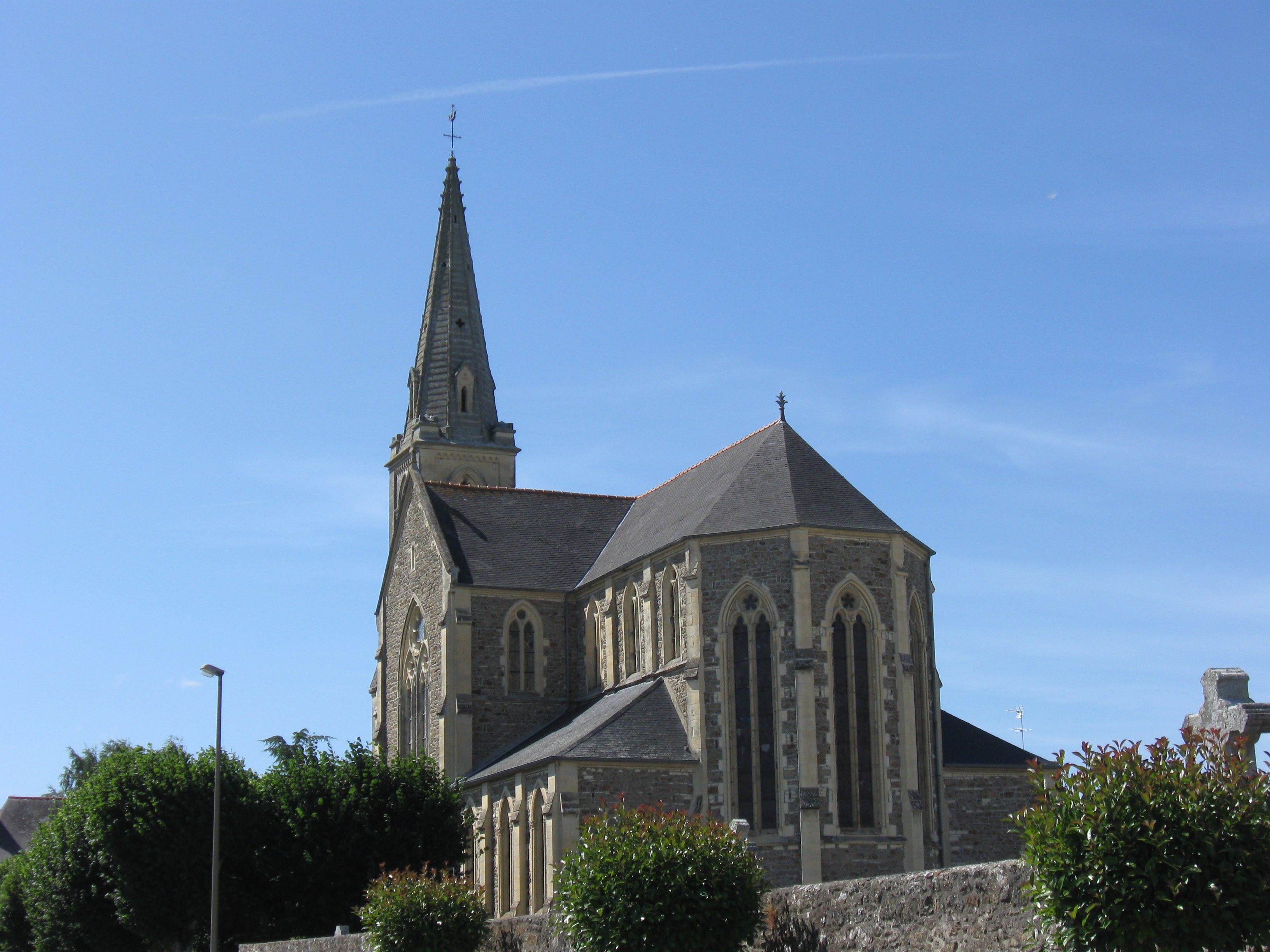 L'église Saint-Lunaire (1864) de Saint-Lormel. (Côtes-d'Armor, région Bretagne).